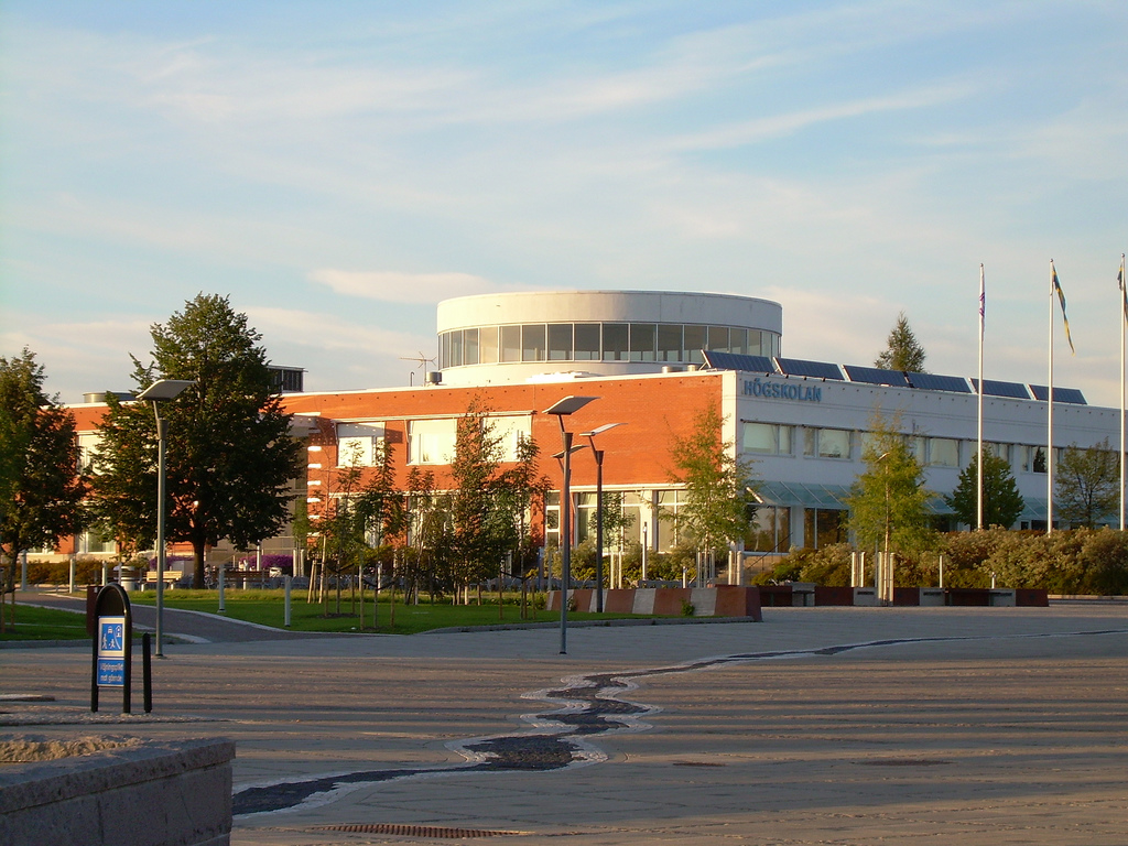 Högskolan Dalarna, Borlänge.